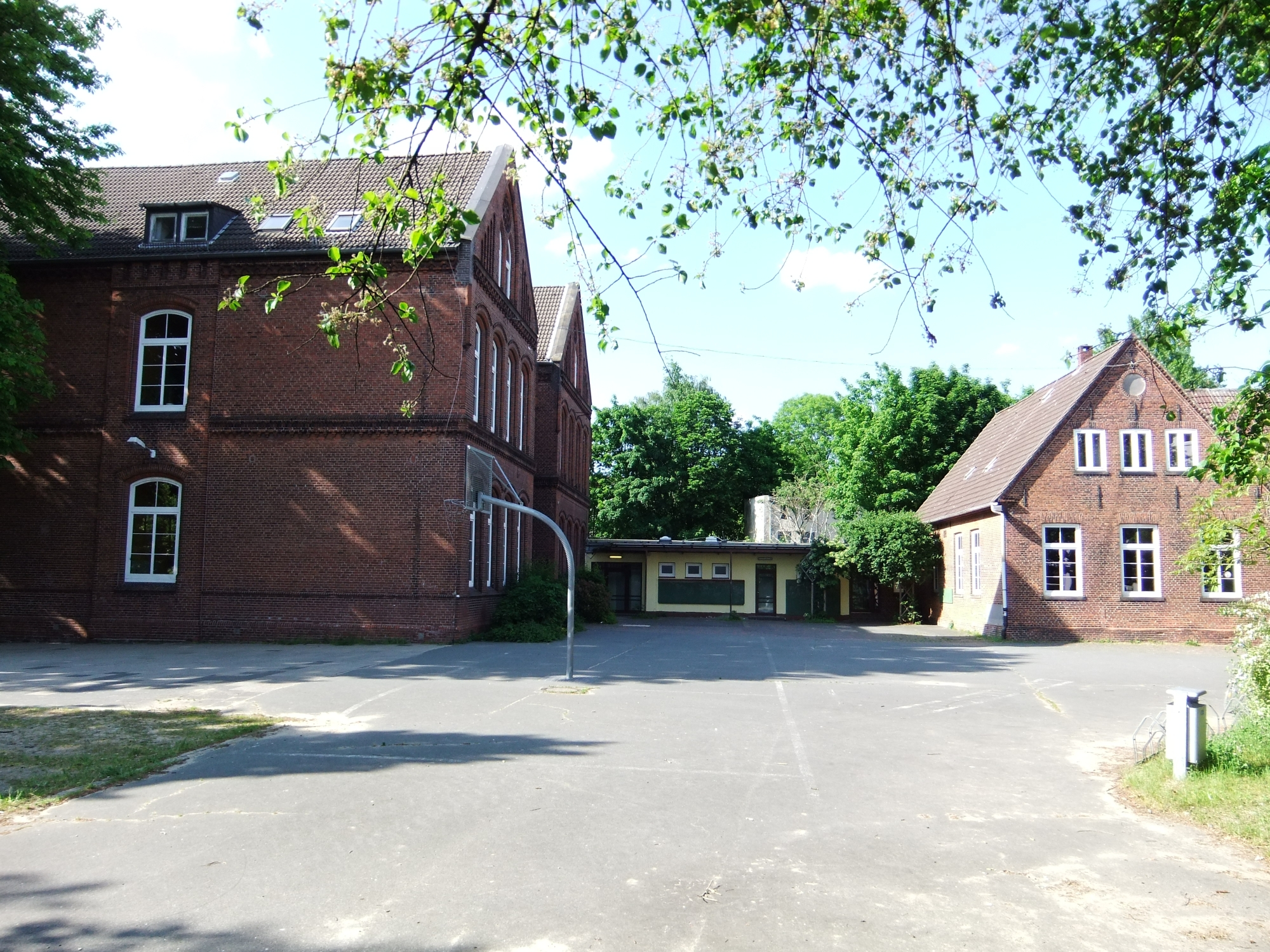 Reformierte Schule, Alt-Leher Schule, Zwingli-Schule in Bremerhaven, Lange Straße 88.Die Denkmalgruppe ist ein geschütztes Kulturdenkmal in der Freien Hansestadt Bremen, mit der Nr. 3128 beim Landesamt für Denkmalpflege registriert.